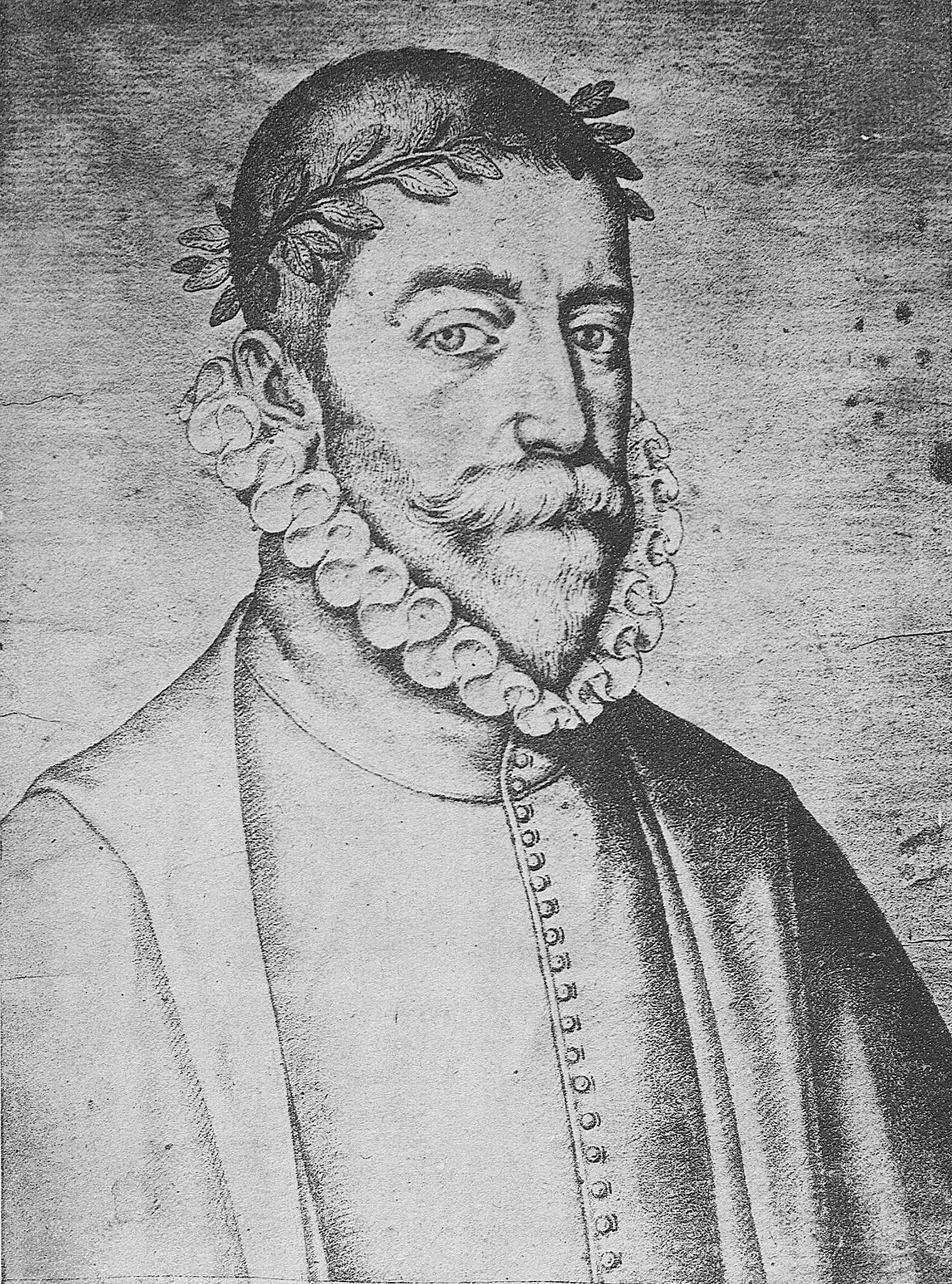 Retrato de Cristóbal Mosquera de Figueroa en Francisco Pacheco, (1564-1644) El libro de descripción de verdaderos retratos, ilustres y memorables varones, [Sevilla, s.n., s.a.]- Real Academia de la Historia (Madrid). Signatura: 1/736. Según el testimonio de la descripción de Francisco Pacheco lo dibujó a partir de un retrato de Felipe de Liaño.